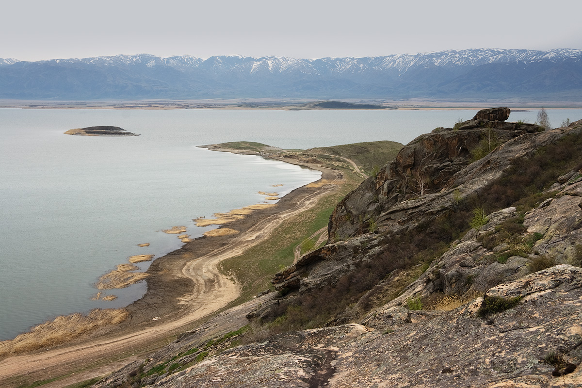 Bukhtarminskoe reservoir